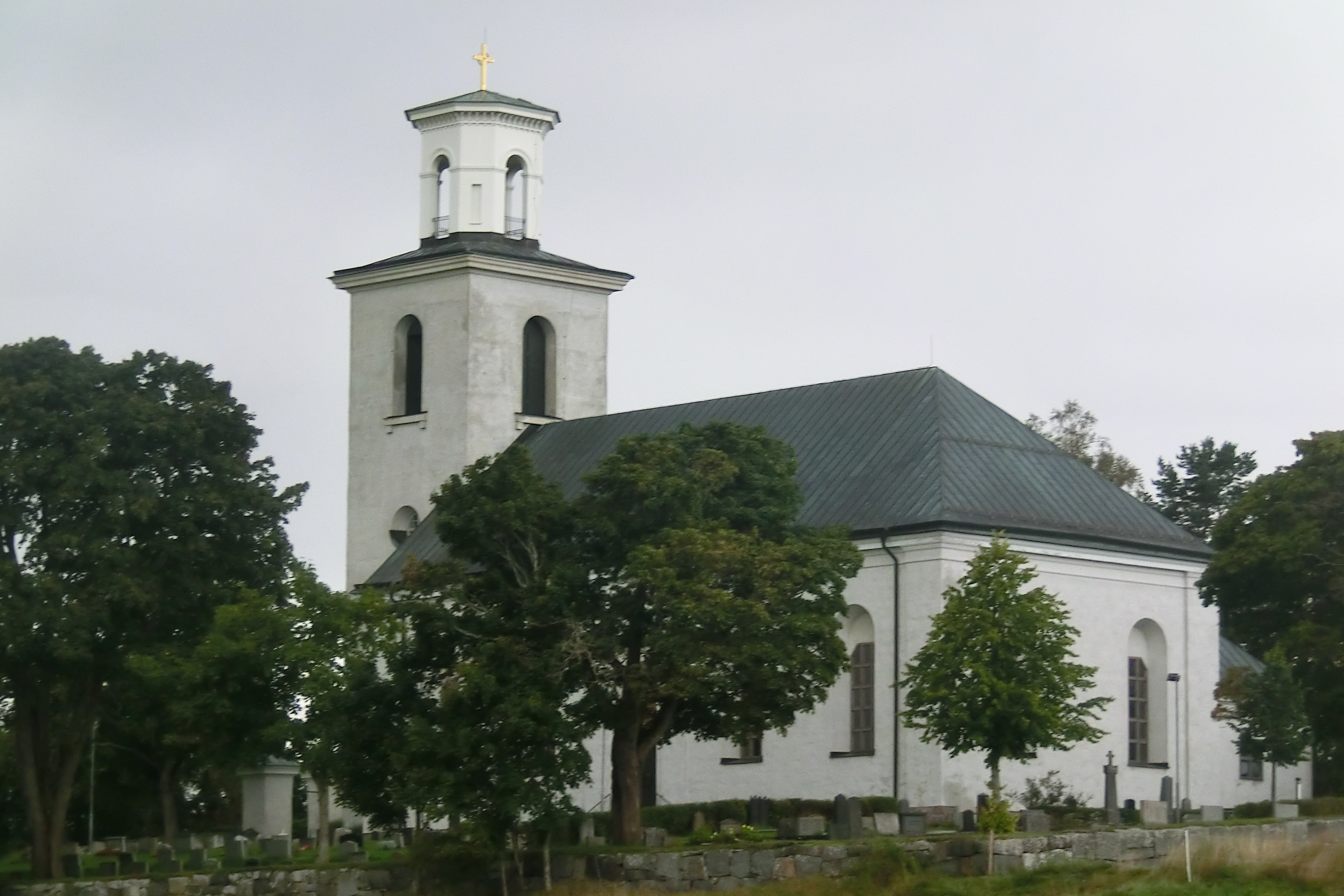 Häggdångers kyrka